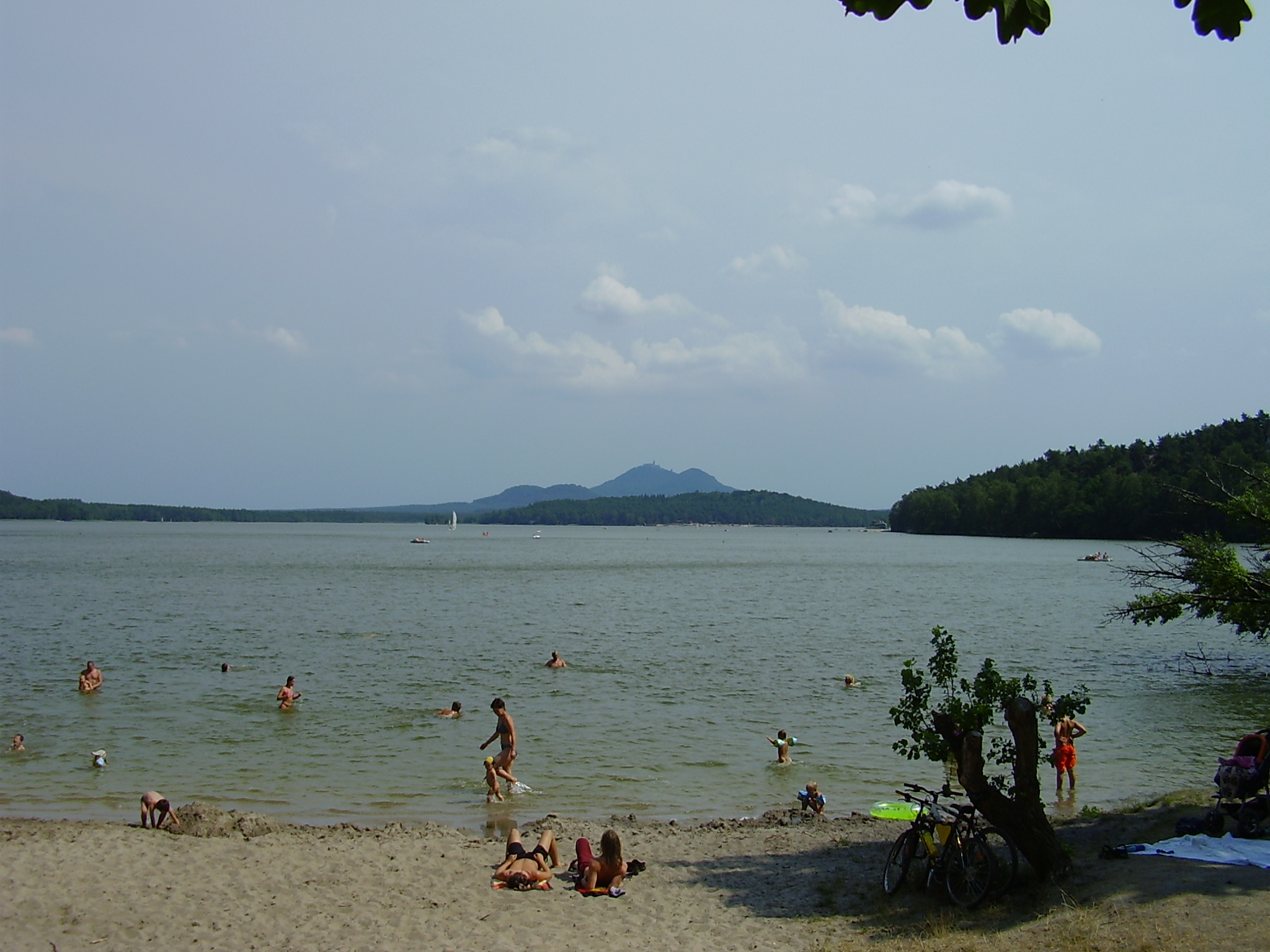 Lake Máchovo jezero, view from Staré Splavy